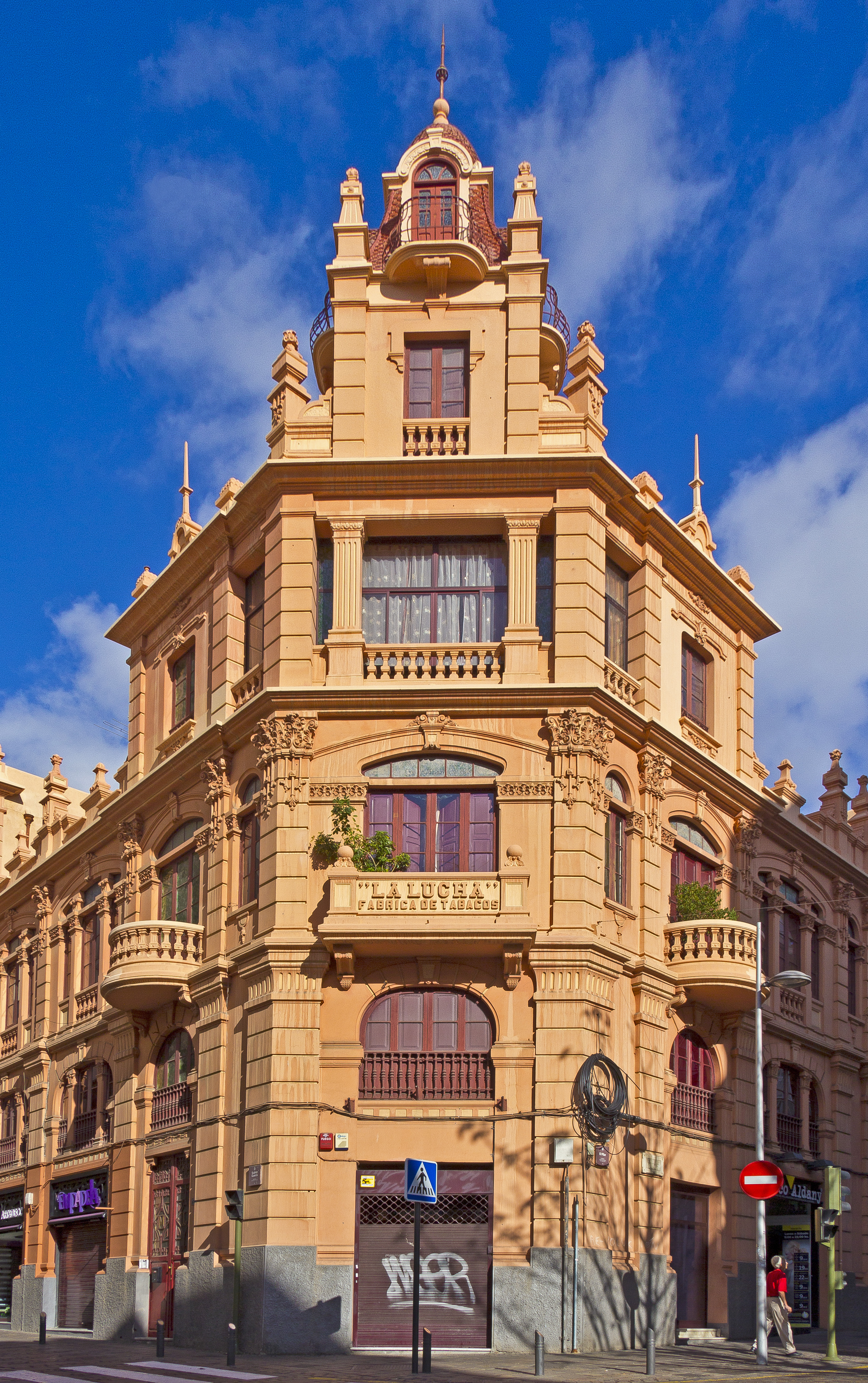 Das Gebäude der ehemaligen Tabakfabrik, wurde von dem Architekten Domingo Pisaca im Jahr 1923 entworfen. Das heute anderweitig genutzte Gebäude befindet sich in der Calle Suárez Guerra in Santa Cruz de Tenerife.